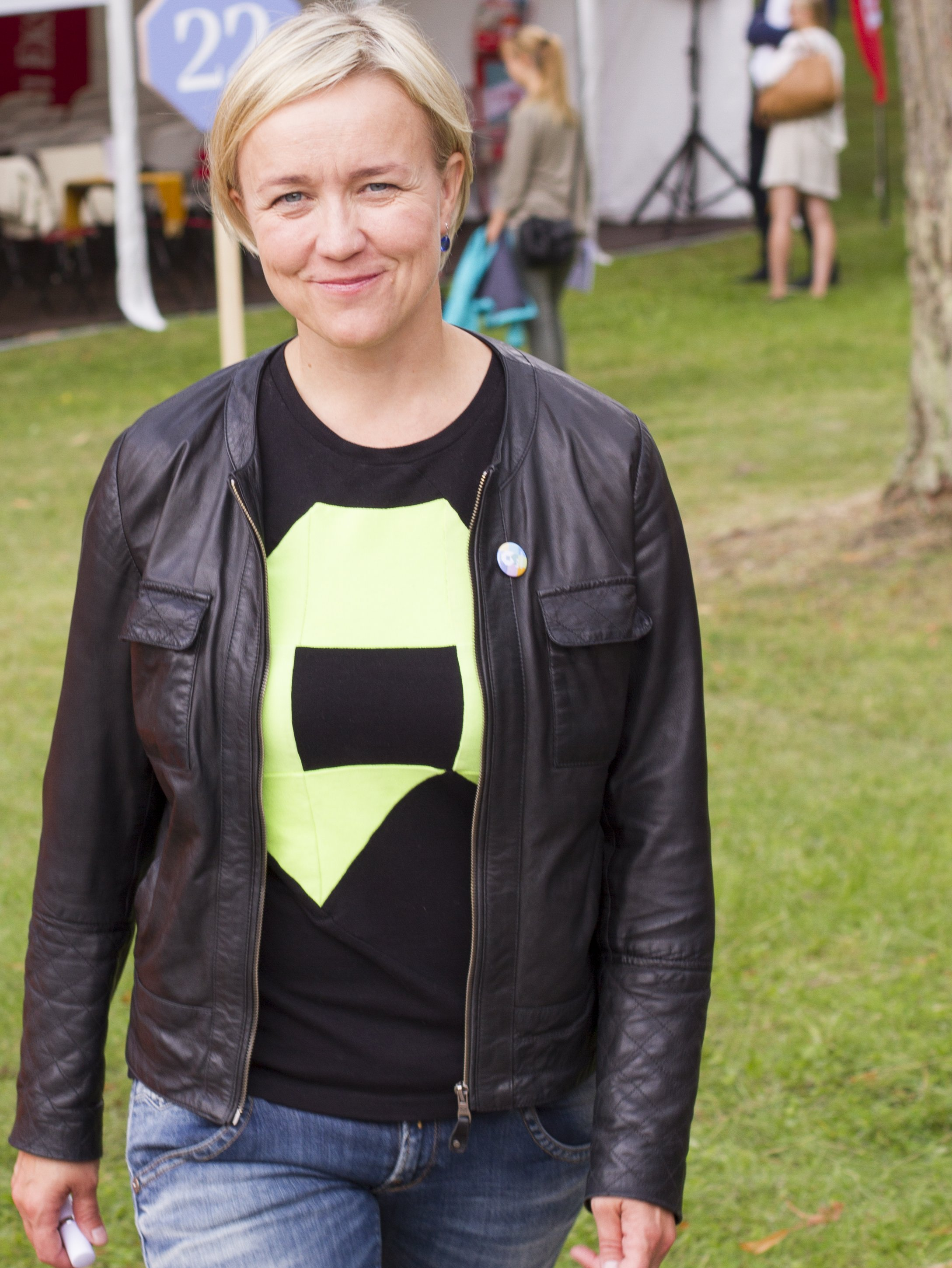 Arvamusfestival 2014